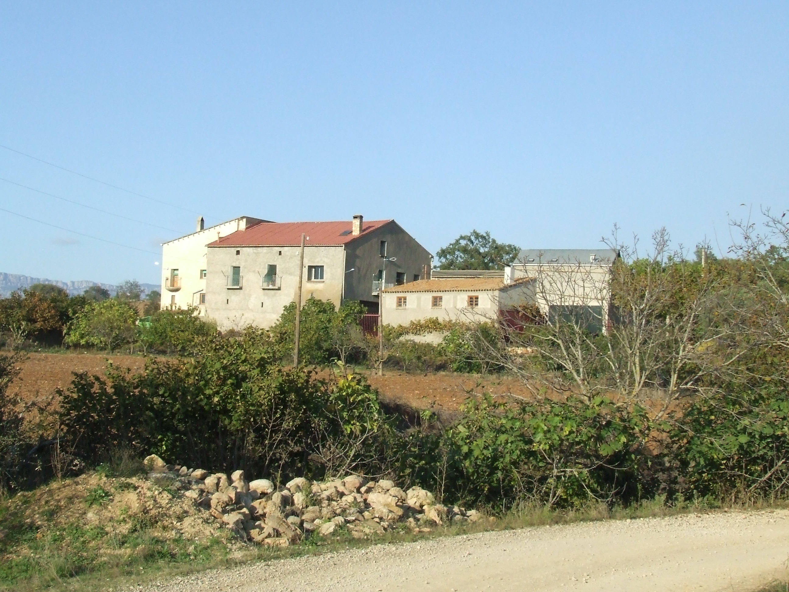 El poble de Gramenet, de Benavent de la Conca (Isona i Conca Dellà, Pallars Jussà)